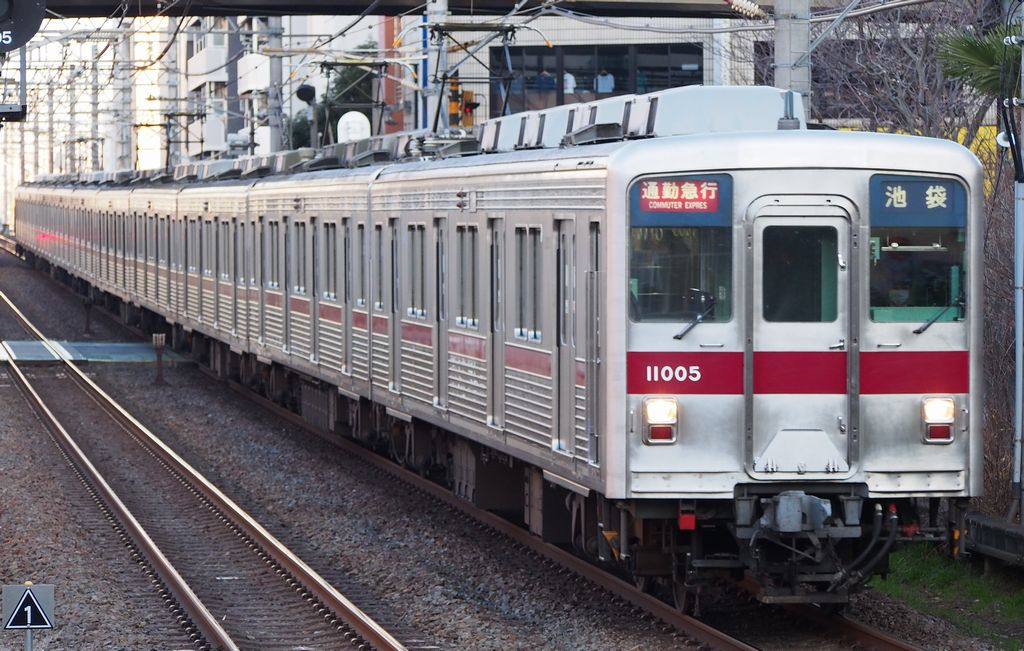 平日朝ラッシュ時に6本運転される通勤急行 Olympus E-PL5